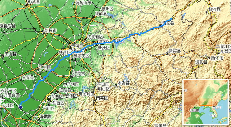 carte réalisée sur umap.openstreetmap This map may be incomplete, and may contain errors. Don't rely solely on it for navigation.